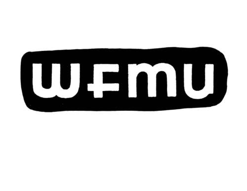 Logo des Senders WFMU